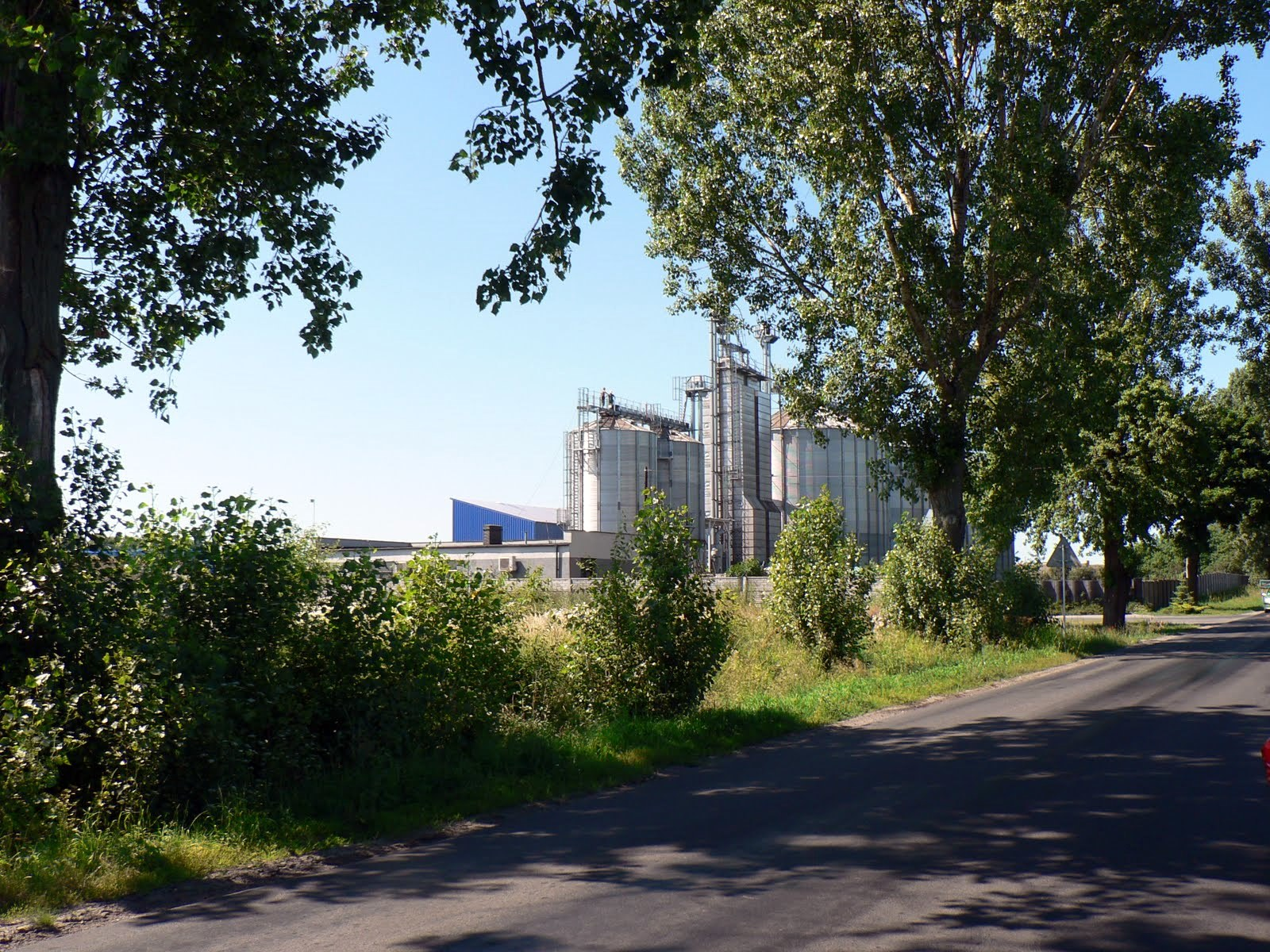 Zakład w Szarleju k. Kruszwicy